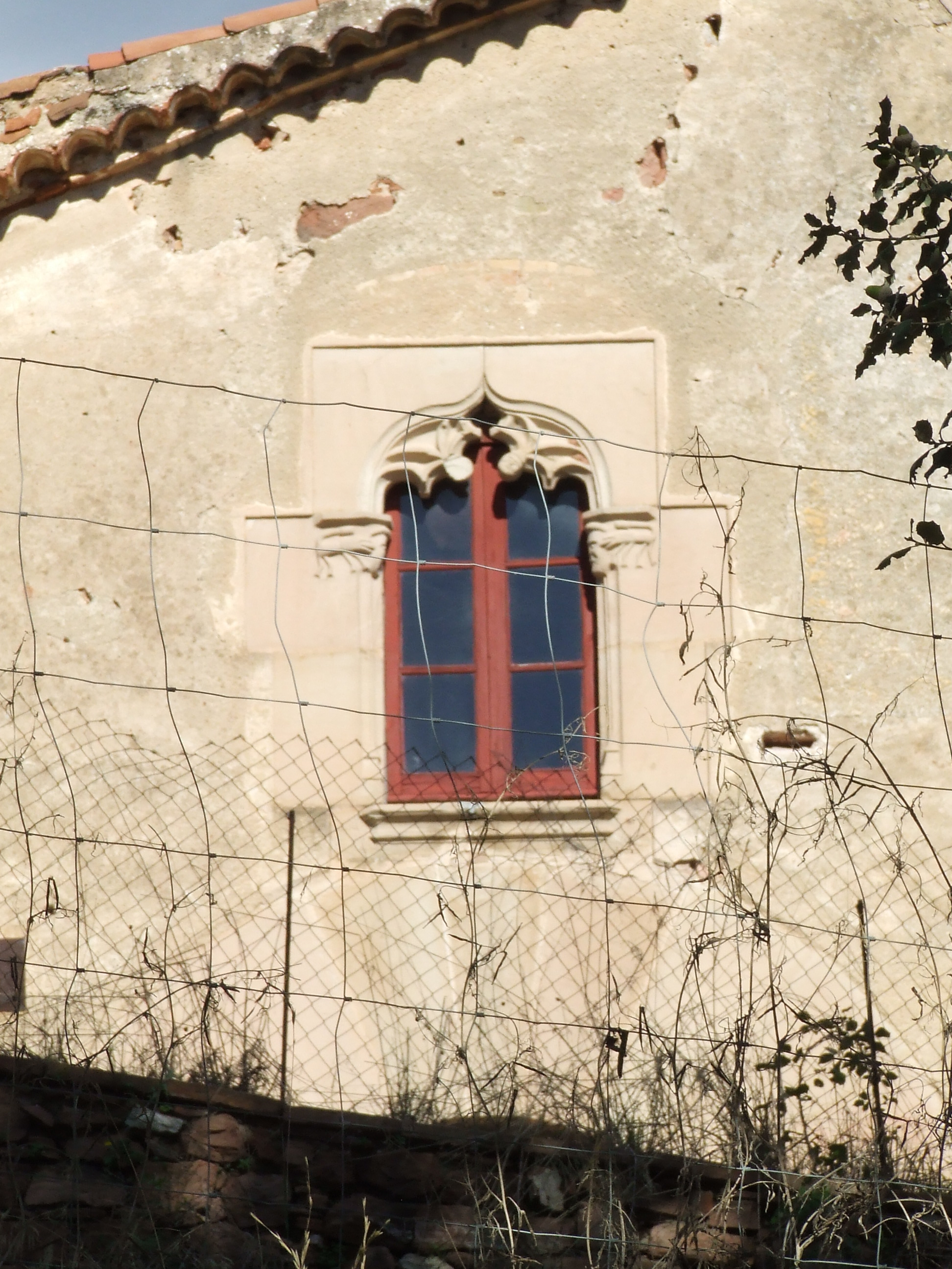 Can Garriga del Solell (Riells del Fai, Bigues i Riells, Vallès Oriental)